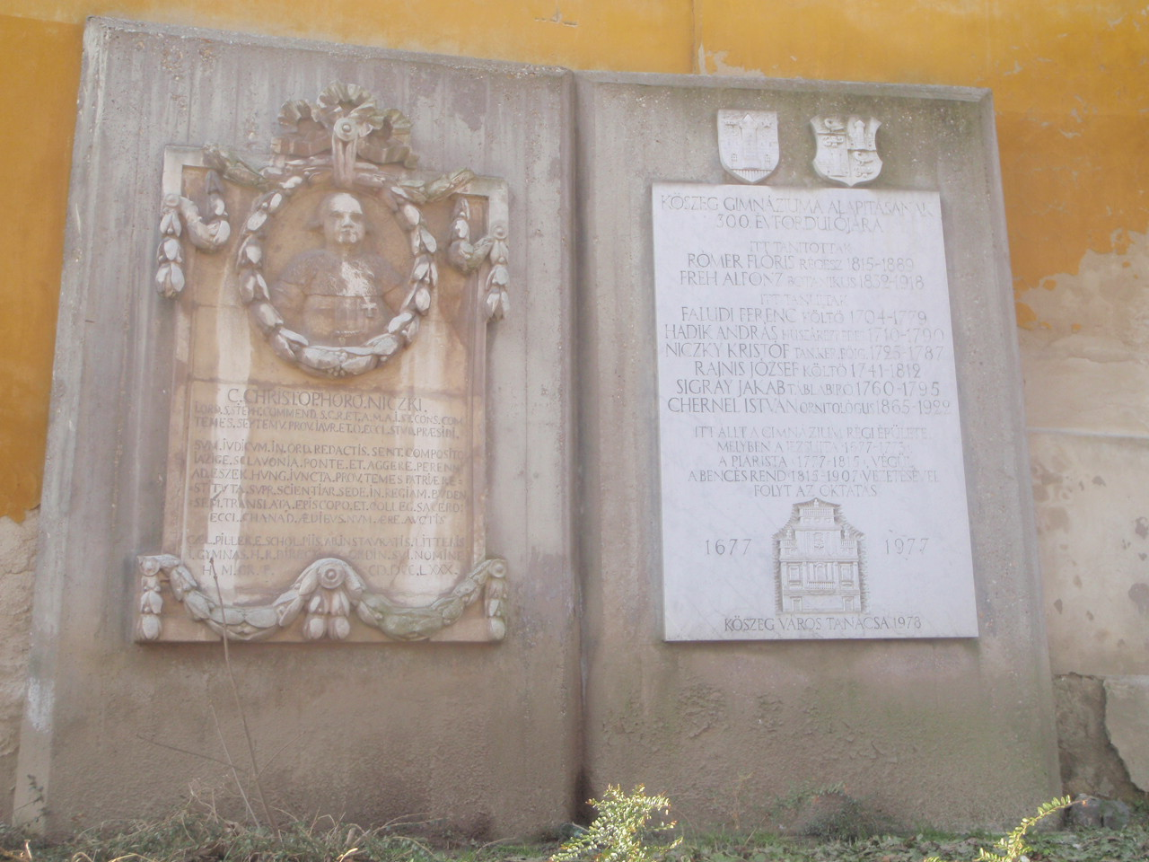 Denkmal von Benediktiner Gymnasium Güns